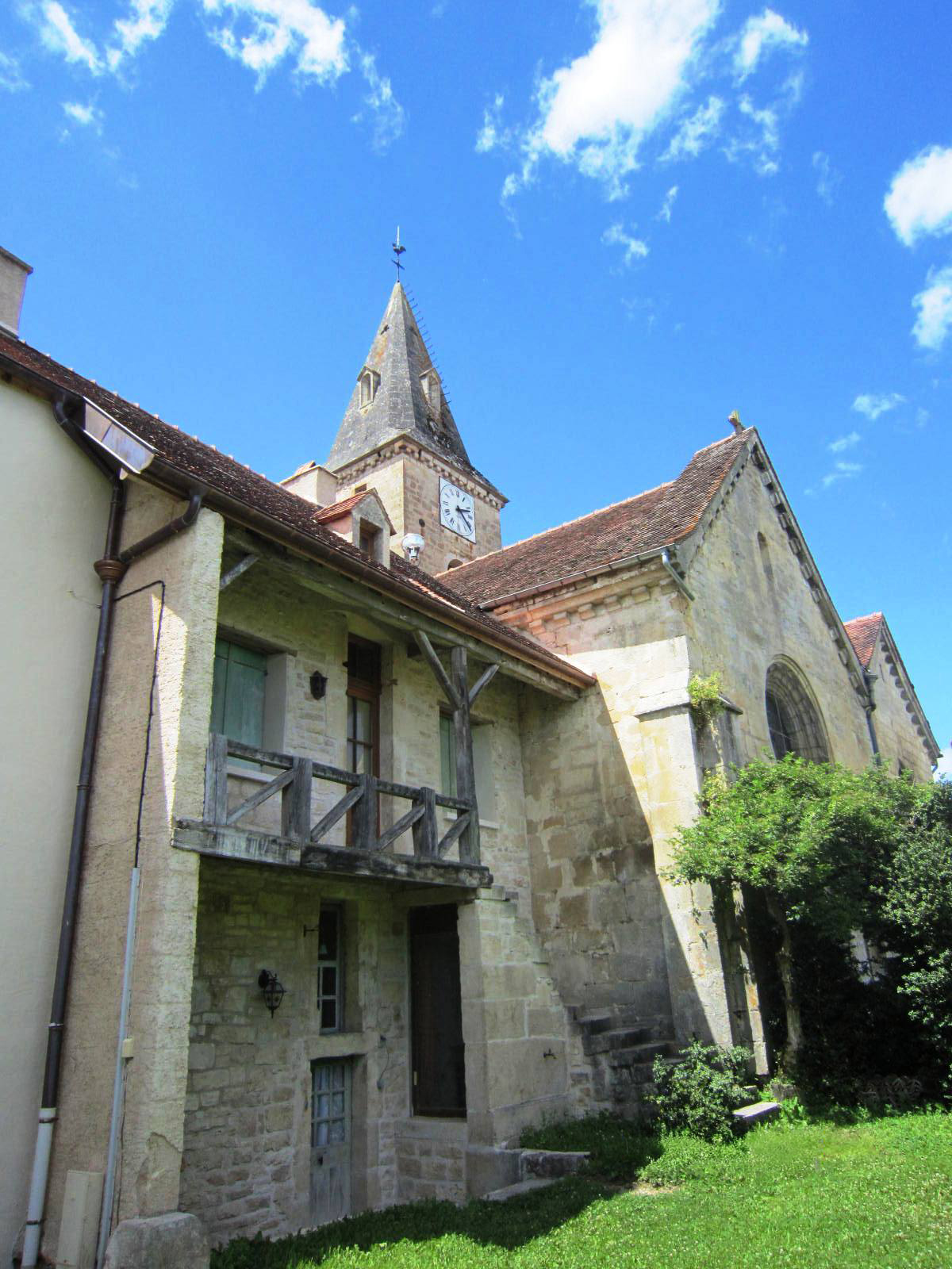 Eglise et façade de la commanderie de Bure-les-Templiers (Côte-d'Or)